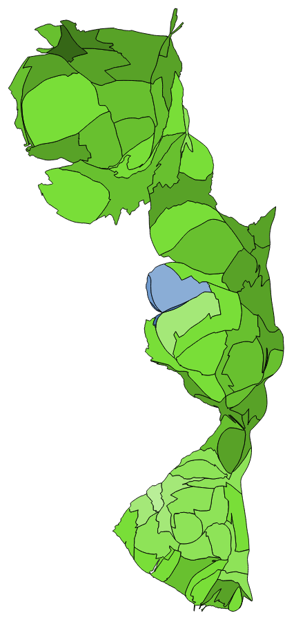 中文（台灣）: 顏色對照表